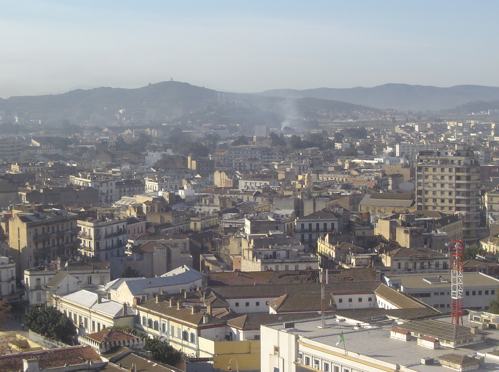 Annaba (Algérie), vue depuis l'hôtel Seybuss.